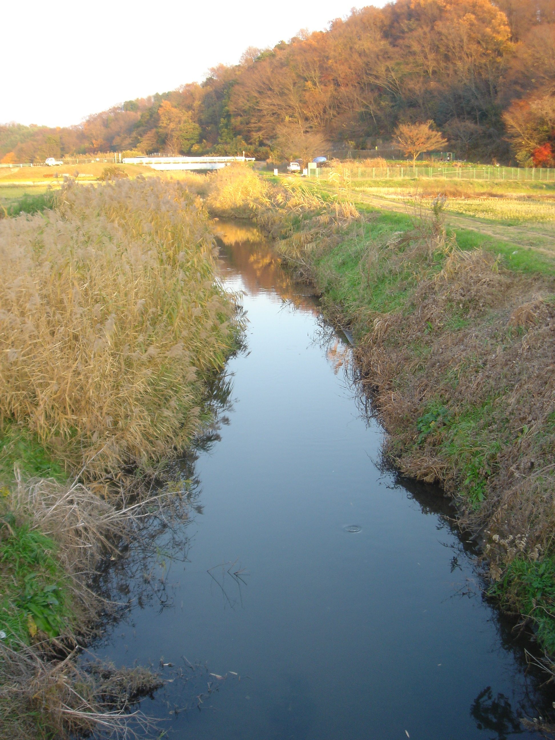 平塚市南金目にて